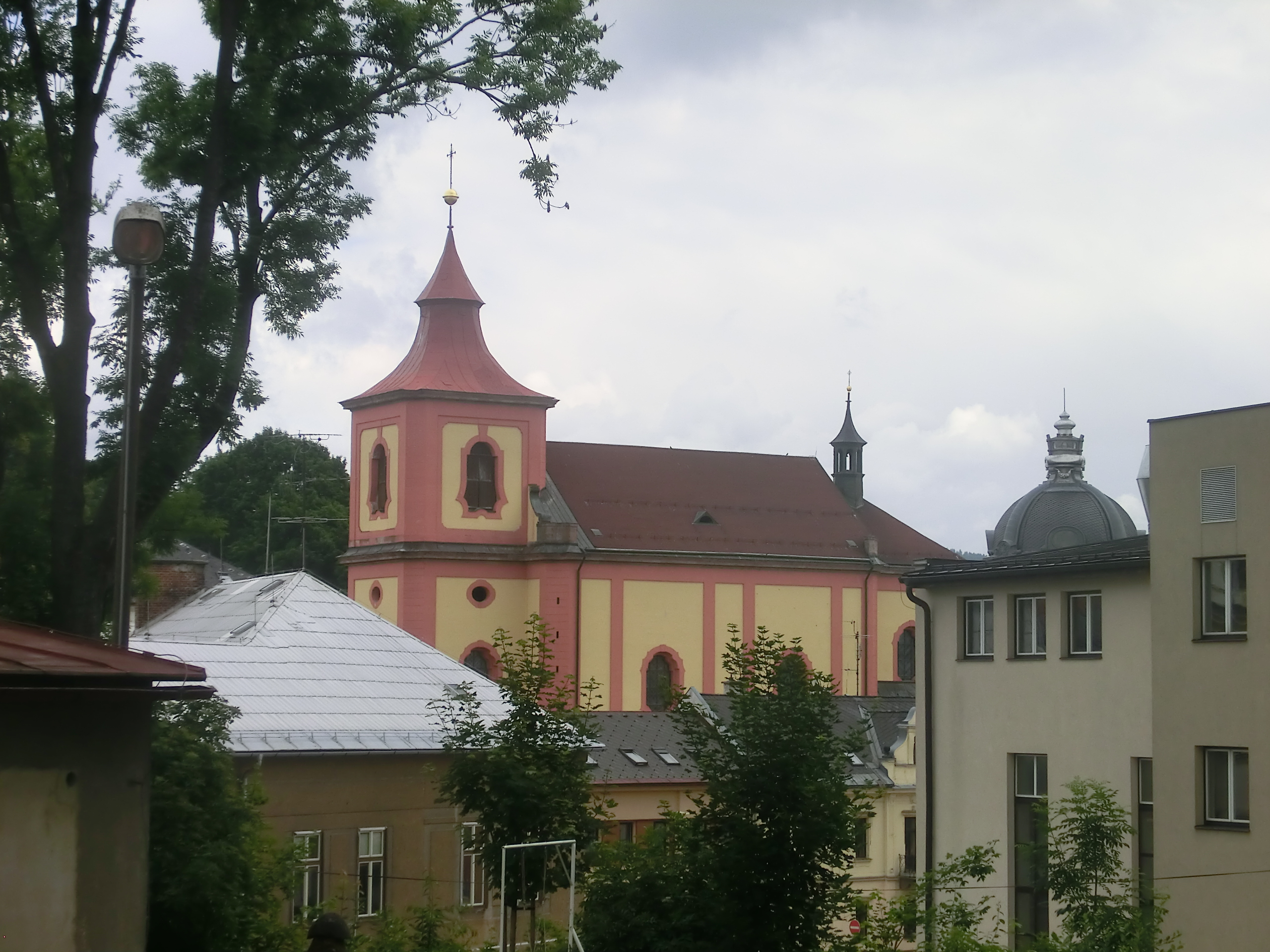 Pohled na kostel ze svahu u sportovního stadionu.